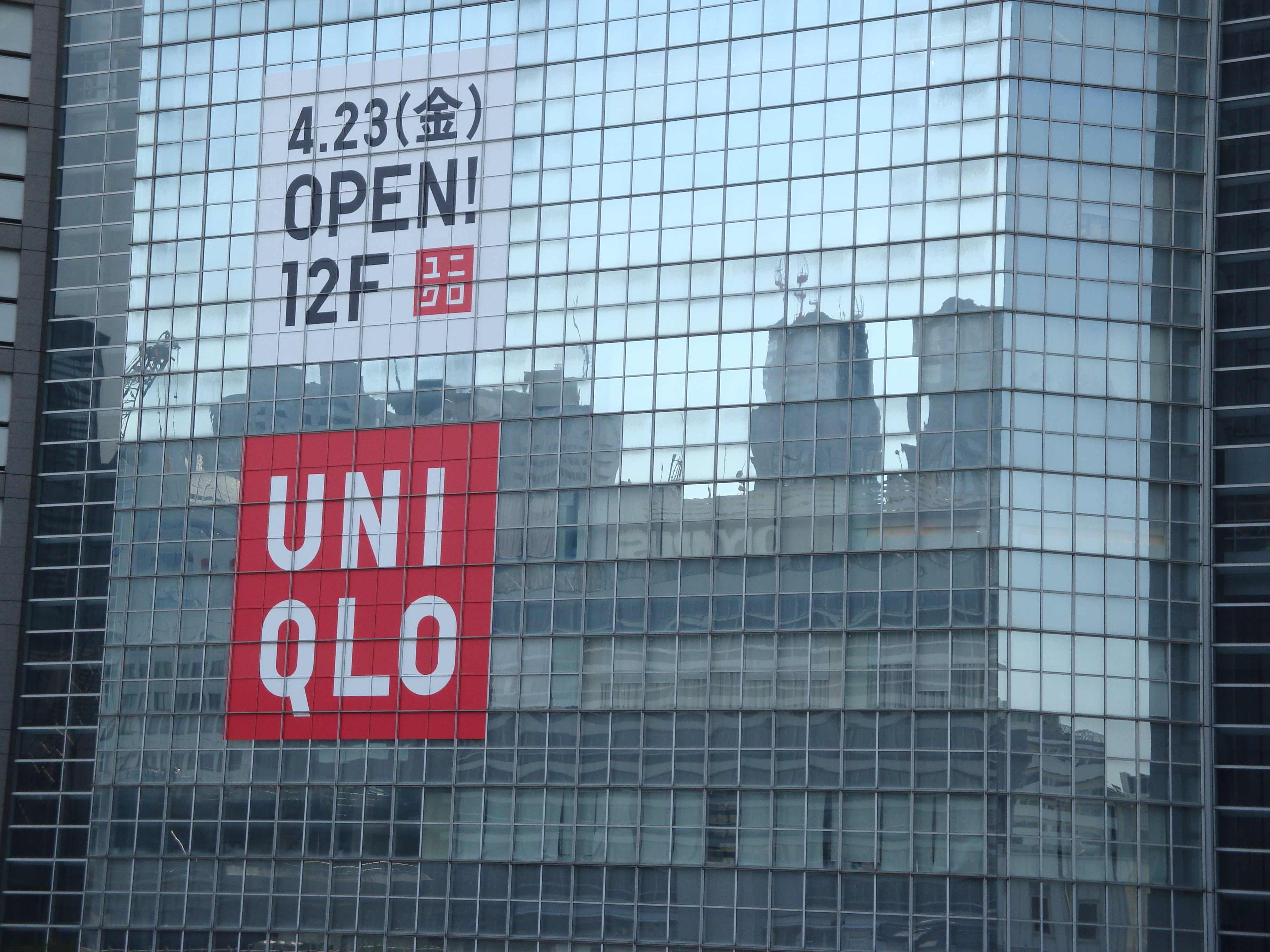 UNIQLO